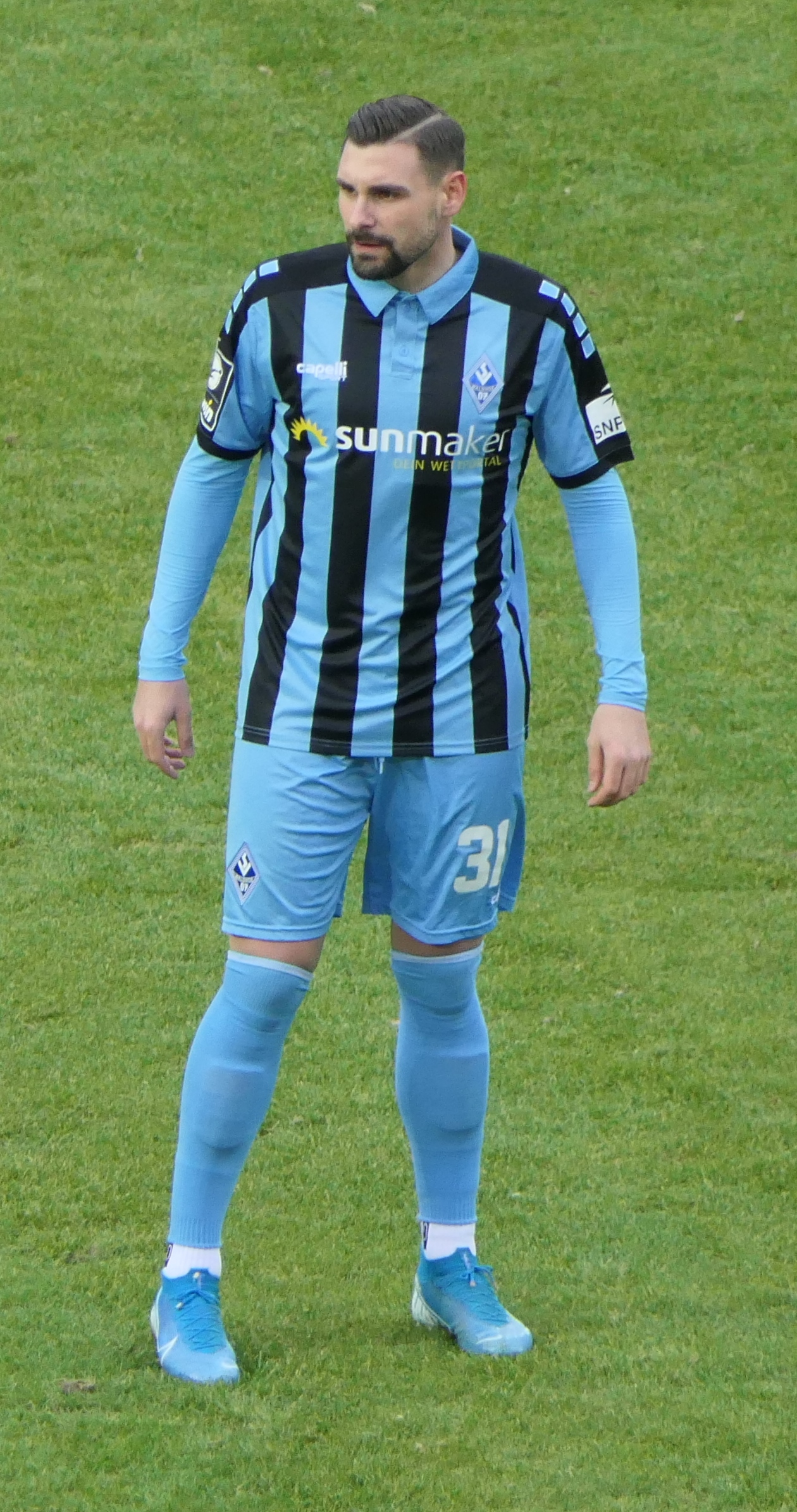 Der Fussballprofi Marcel Hofrath im Trikot vom SV Waldhof Mannheim beim Heimspiel gegen Eintracht Braunschweig am 08.12.2019.